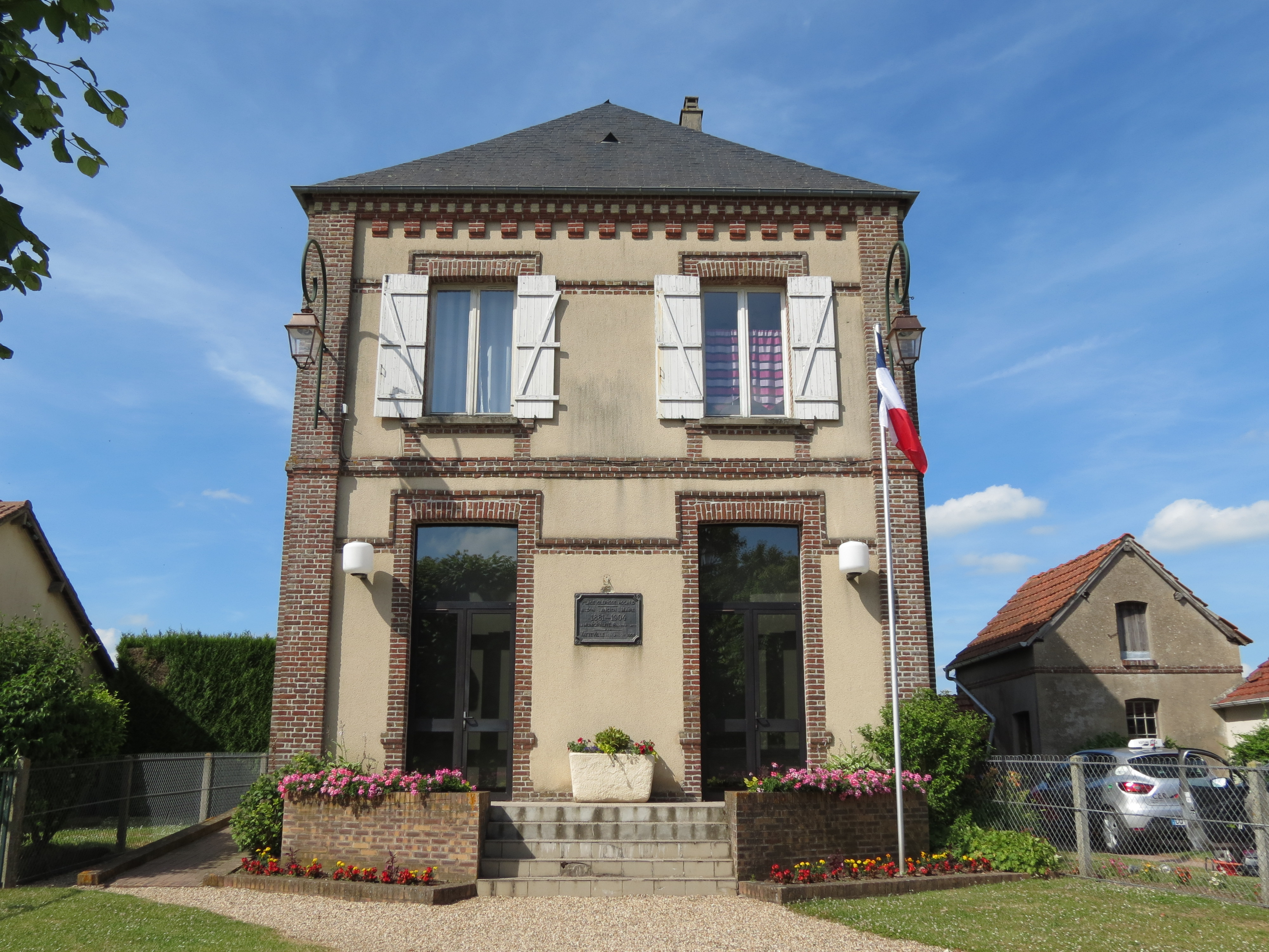 Mairie de Vatteville.